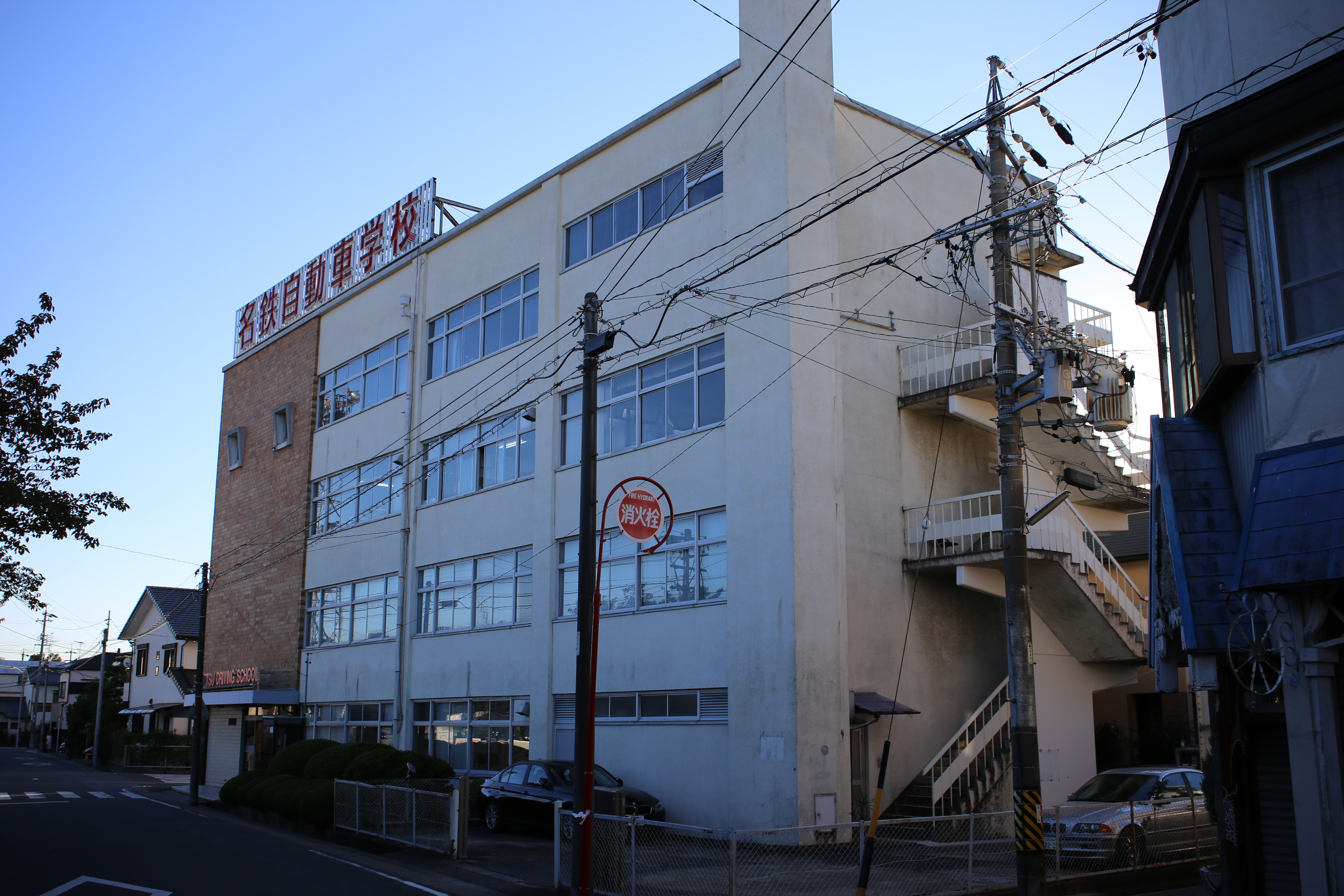 名古屋市緑区鳴海町文木の名鉄自動車学校校舎を東側公道北側より撮影